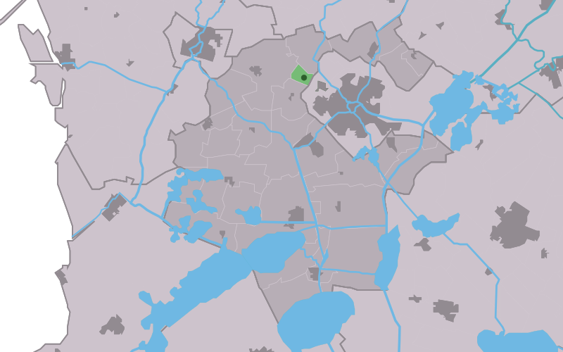 Kaartsje fan himrik fan Tsjalhuzum